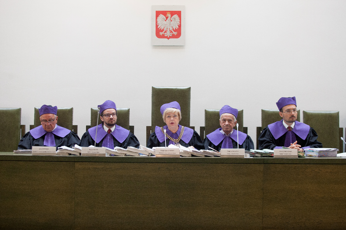 Trybunał Stanu w Polsce